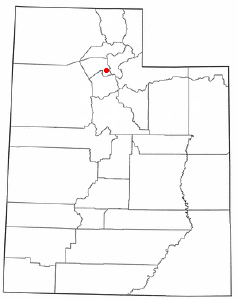 Localización de Centerville, Utah.